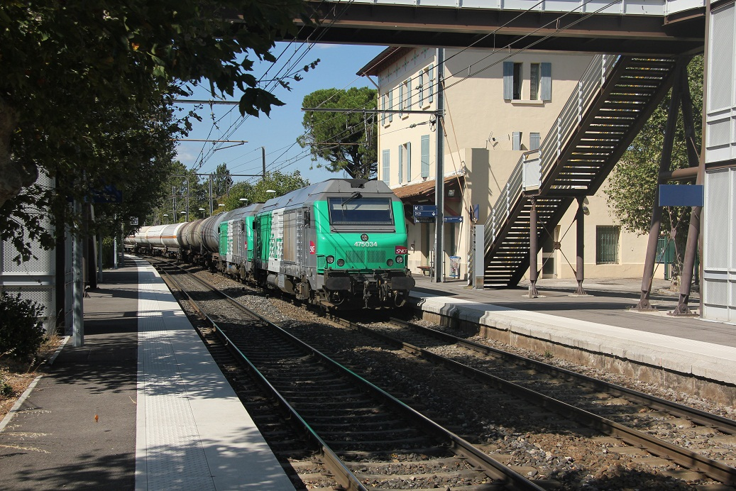 La BB 75034 en tête d'un train de fret passe sans arrêt en gare d'Istres en août 2010, Bouches-du-Rhône, France.